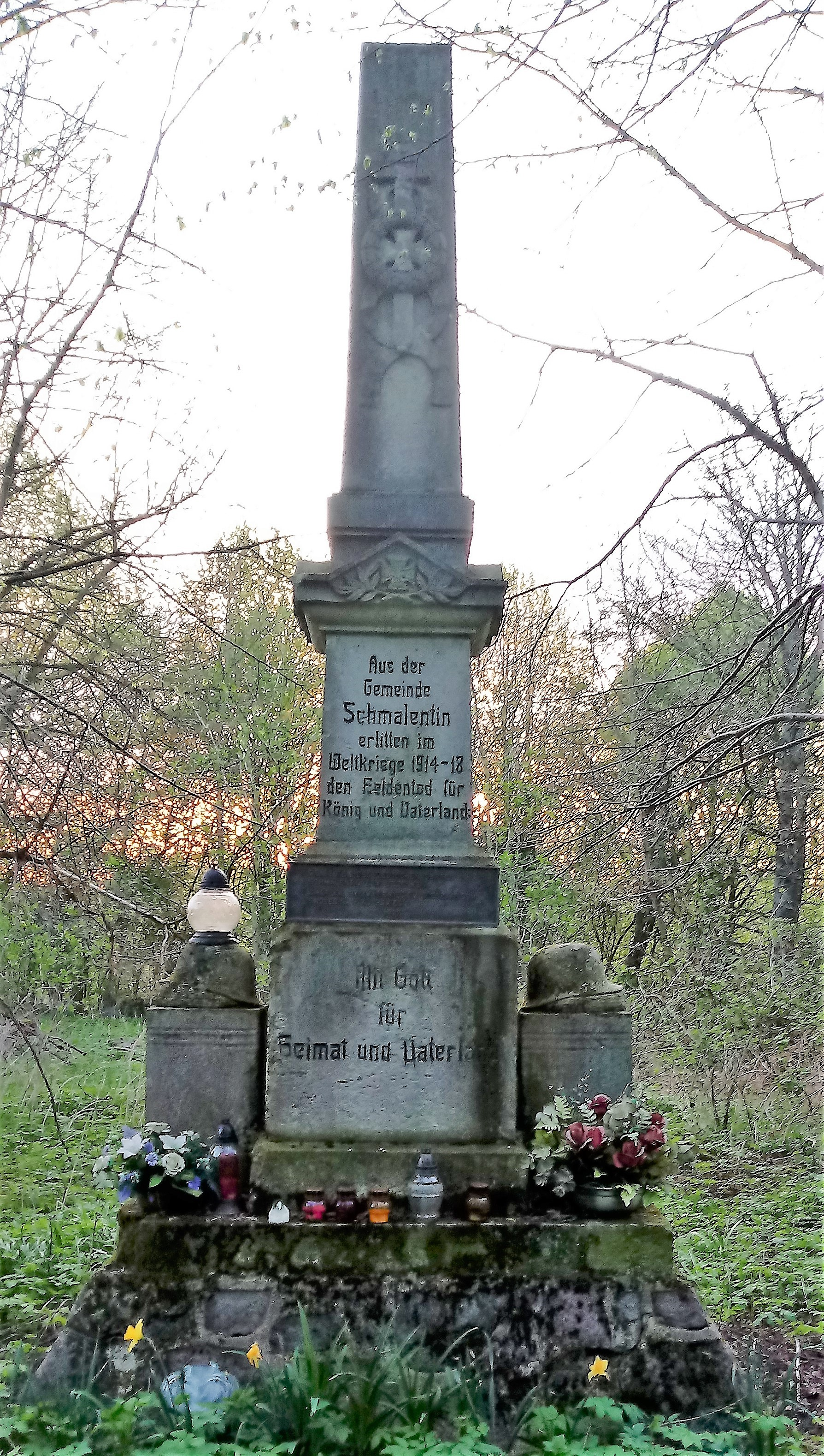 Monument ku czci poległym mieszkańcom Smolęcina w I wojnie światowej